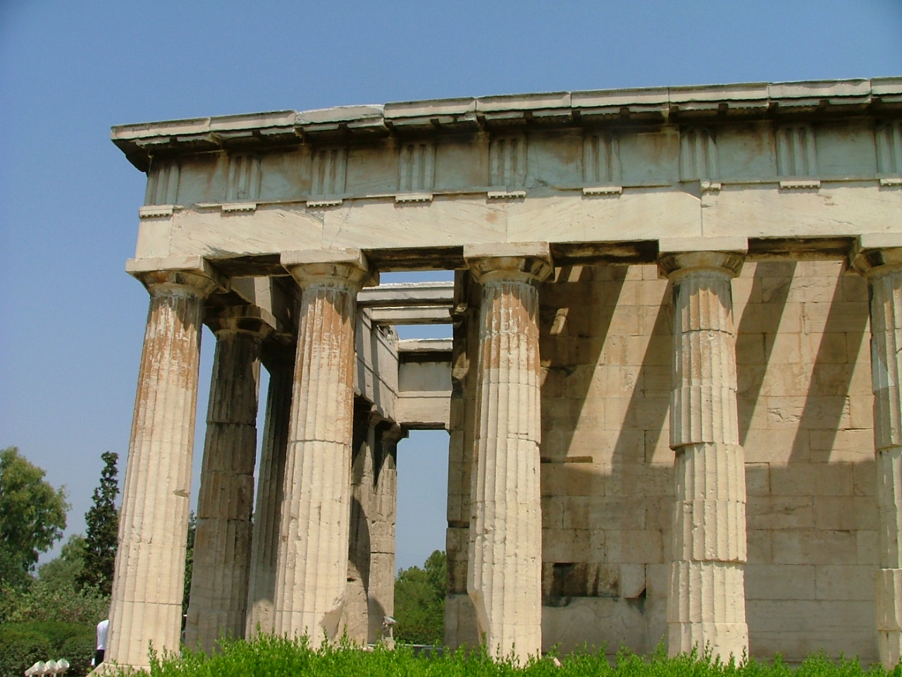 Templo de Hefesto en el Ágora de Atenas.